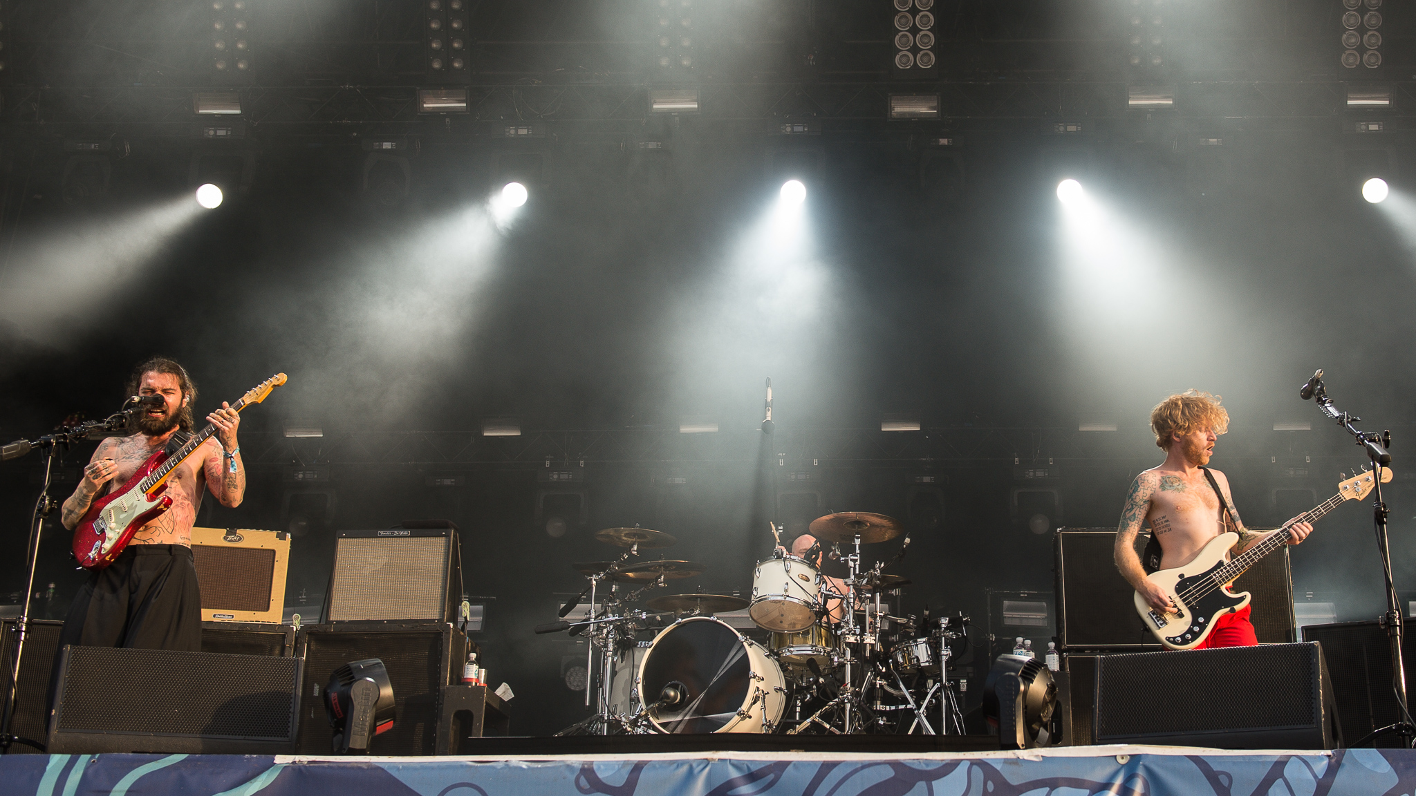 Ben Johnston,Biffy Clyro,Deichbrand,ESK Events & Promotion GmbH,Festival,James Johnston,Konzert,Livekonzert,Livemusik,Sea-Airport Cuxhaven/Nordholz,See-Flughafen Cuxhaven/Nordholz,Seeflughafen Cuxhaven/Nordholz,Simon Neil,Water Stage